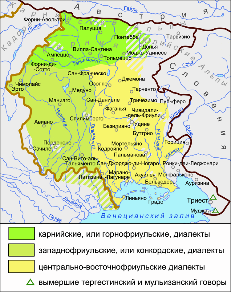 Карта диалектов фриульского языка. Источники: Treccani. Enciclopedia. Friulani, dialetti (2010). Коряков Ю. Б. Приложение. Карты. 9. П-ов Истрия и юг области Фриули-Венеция-Джулия // Языки мира. Романские языки. — М.: Academia, 2001. — ISBN 5-87444-016-Х. Нарумов Б. П., Сухачёв Н. Л. Фриульский язык // Языки мира. Романские языки. — М.: Academia, 2001. — С. 366—367. — ISBN 5-87444-016-Х